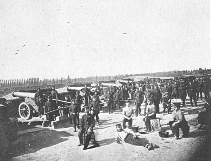 Deutsch-Französischer Krieg, Belagerung von Straßburg, Kehl Nordbatterie 24 Pfünder